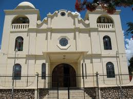 Catedral de Nuestra Señora de los Remedios y San Pablo del Itza, ubicada en la Isla de Ciudad Flores, en el Departamento de Peten, Guatemala.